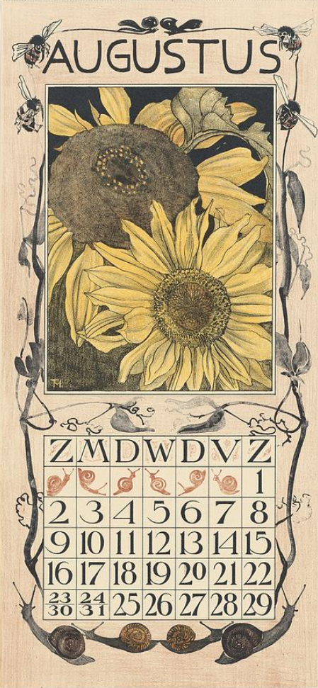 Kalenderblad augustus 1902